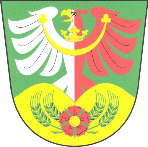 znak, Chrbonín, okres Tábor